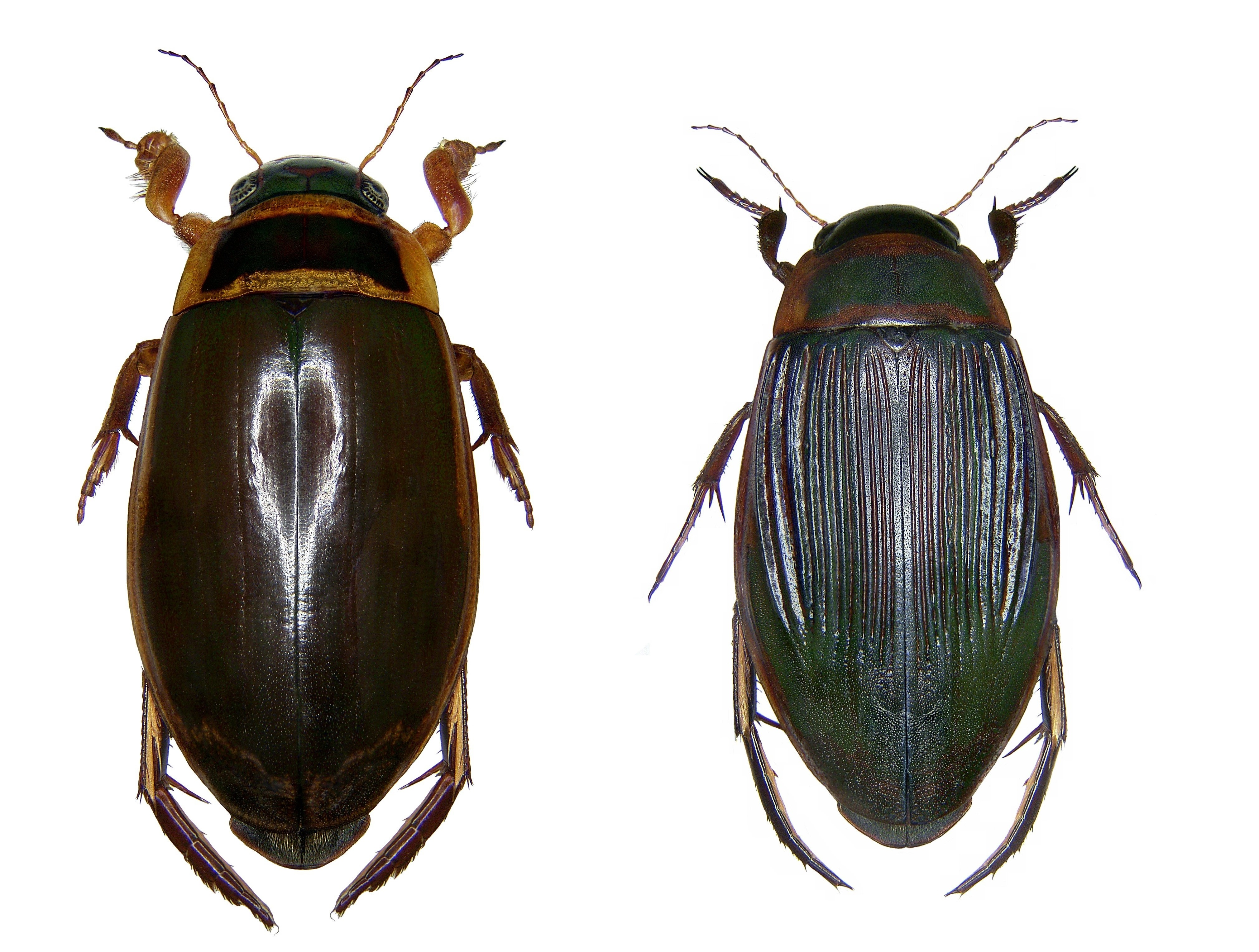 Table of different Dytiscidae species. From Edmund Reitter (1845-1920): "Fauna Germanica: Die Käfer des deutschen Reiches" 1909.